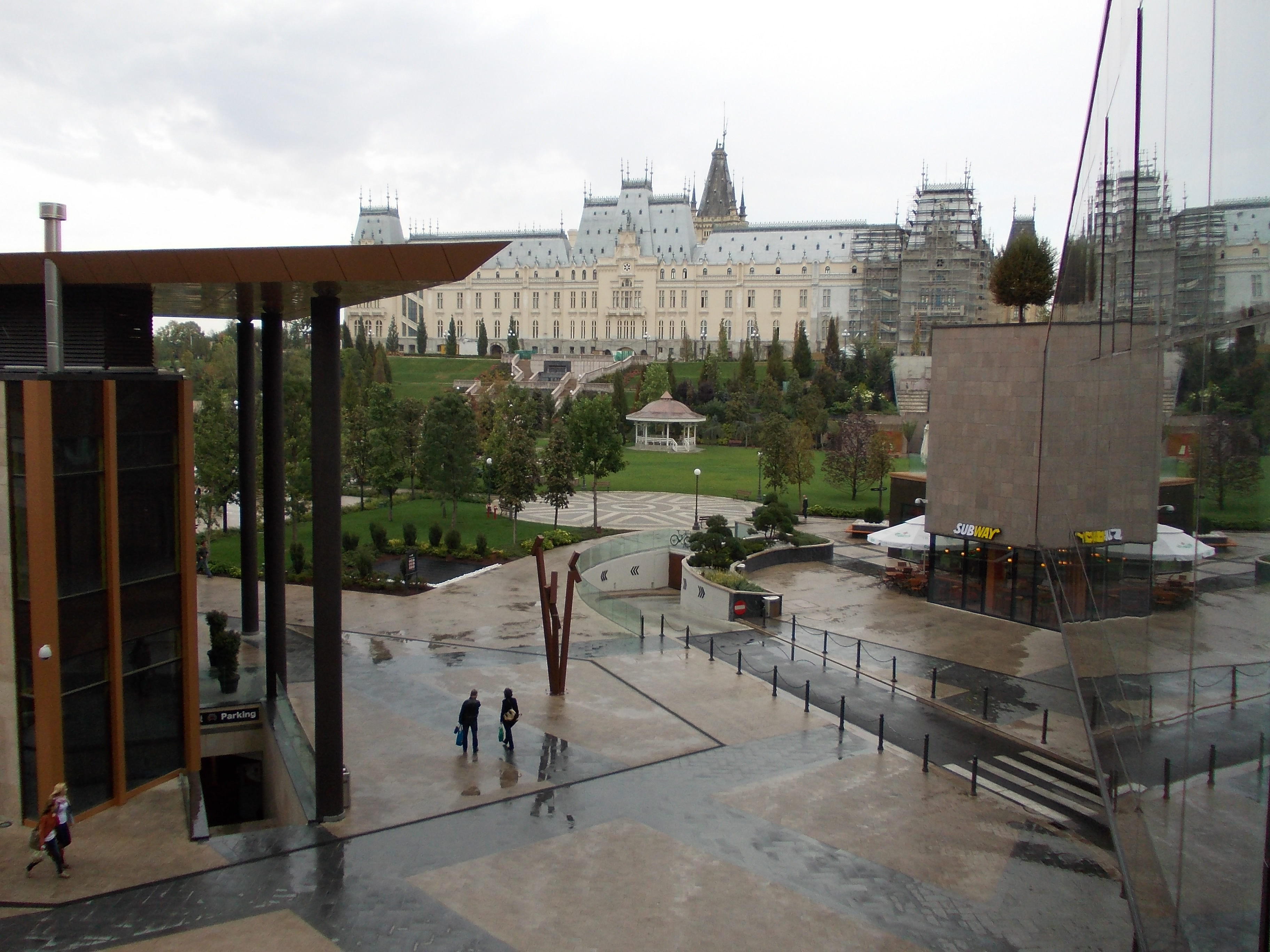 Grădina Complexului Palas